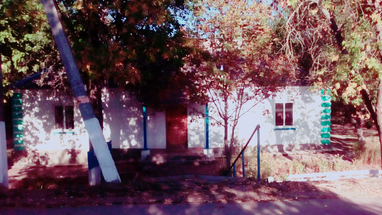 Седнівська сільська рада.